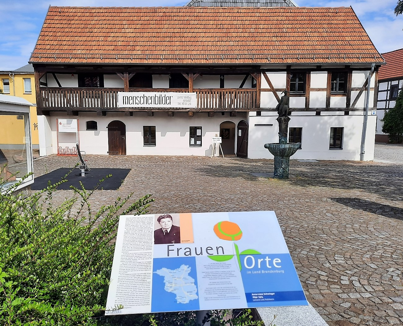 Die Kleine Galerie Hans Nadler in Elsterwerda mit der 2014 aufgestellten Frauenorte-Gedenktafel für die Lehrererin Anna-Liesa Schwieger.